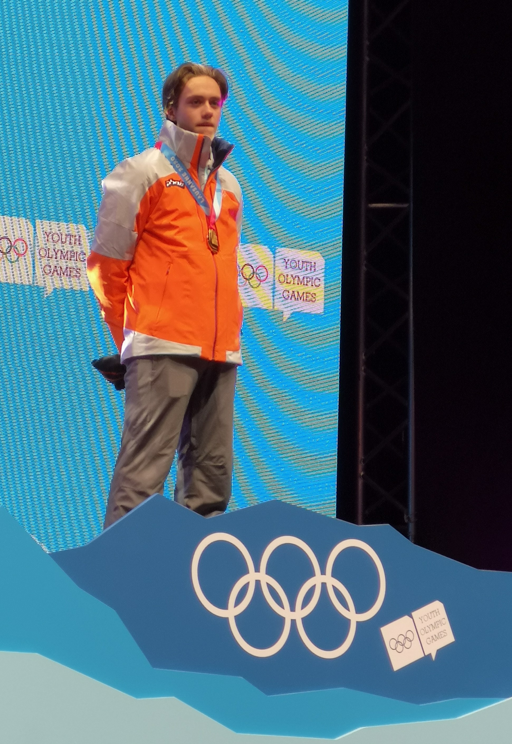 Nikolai Holmboe pendant la remise des médailles du cross masculin de ski de fond des JOJ de Lausanne 2020.